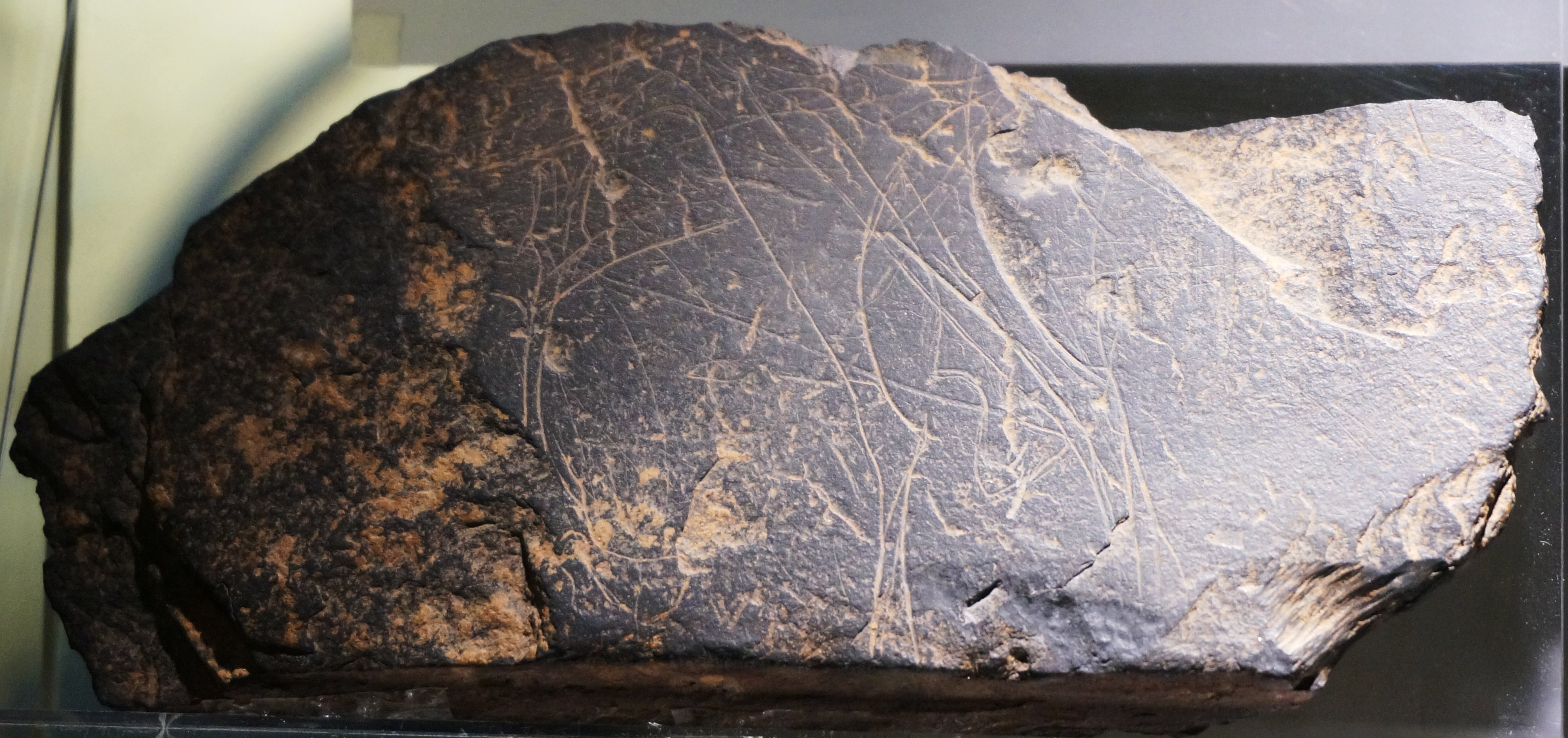 palimpseste au cervidé, tête d'ours, pattes à sabots et d'autres à griffes ; pierre gravée au magdalénien trouvée à Roc-la-Tour.